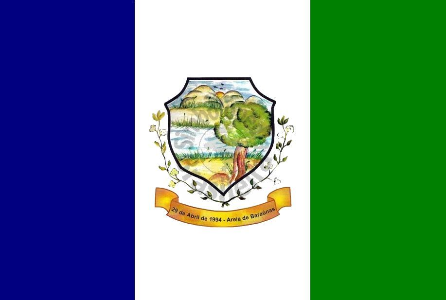 Bandeira do município de Areia de Baraúnas na Paraíba